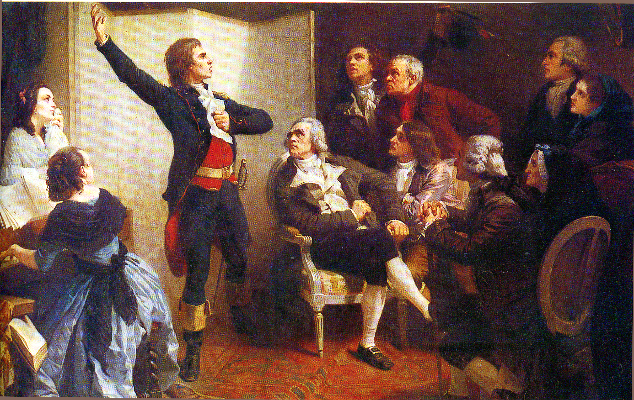 Руже де Лиль исполняет песню. 1792.